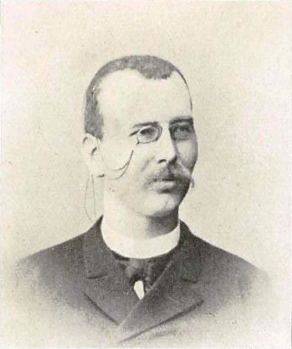 Portrait d'Aimé Vaschy